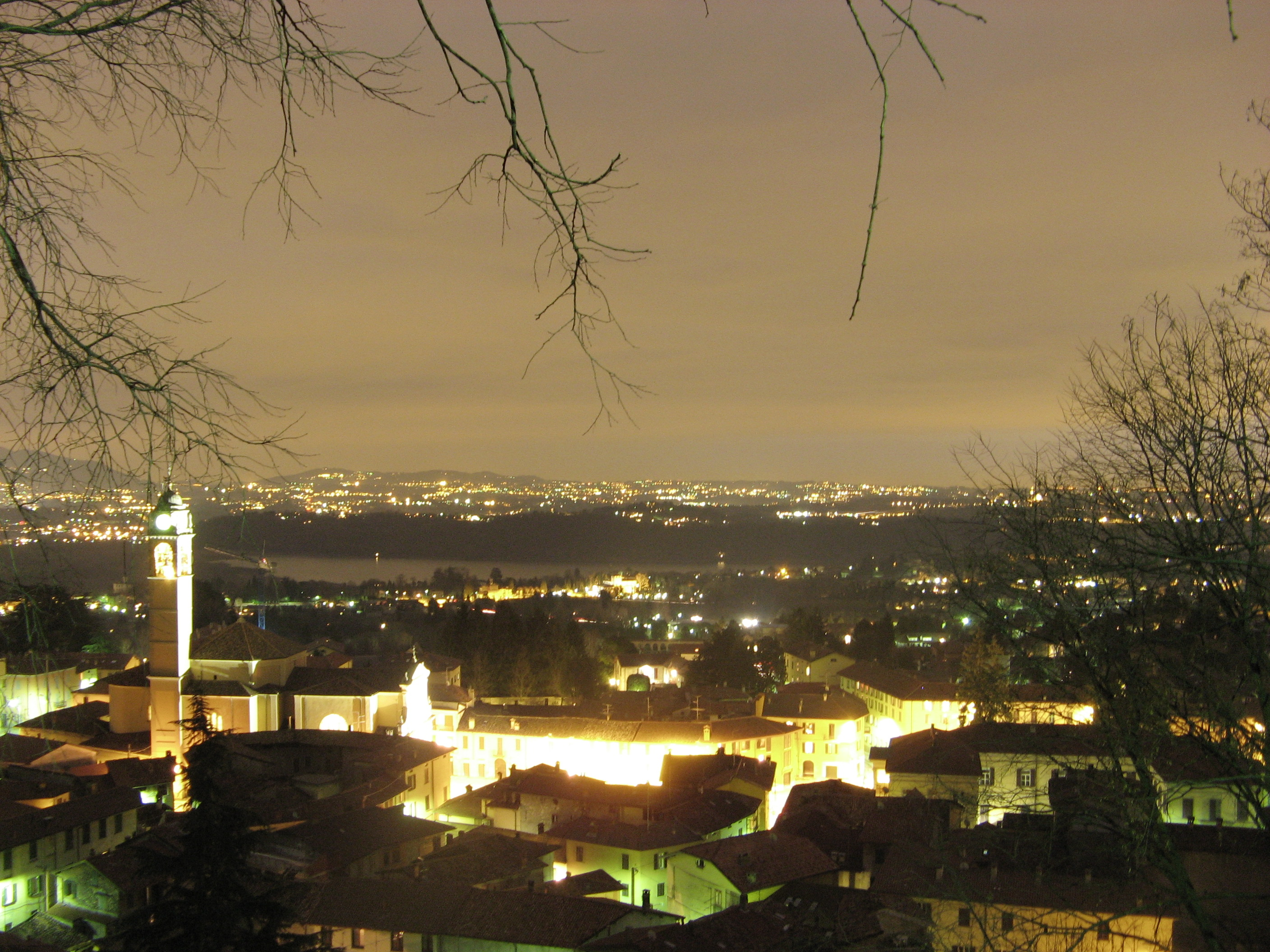 Veduta di Albavilla